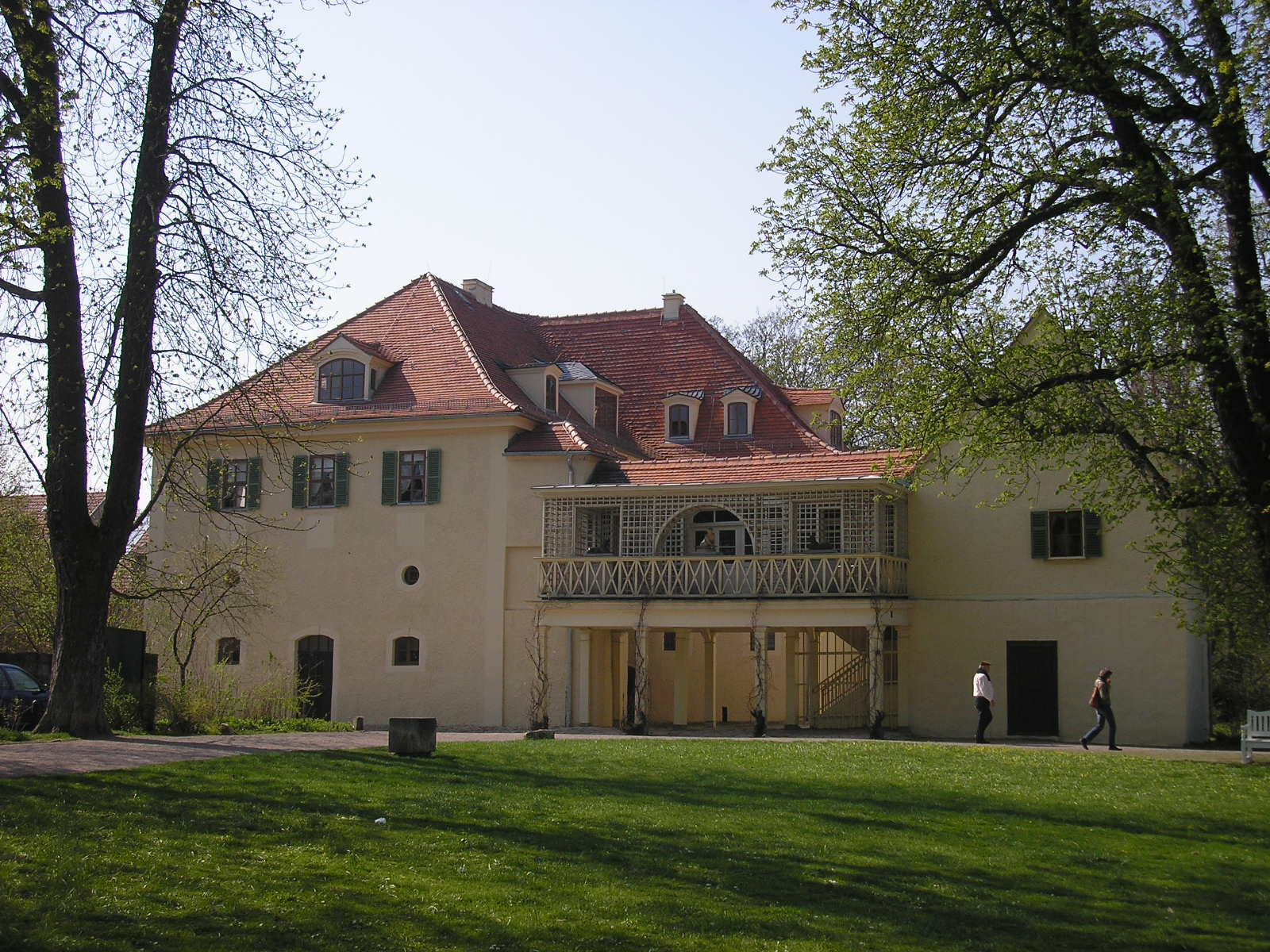 Rückansicht des Schlosses Tiefurt bei Weimar (Thüringen).